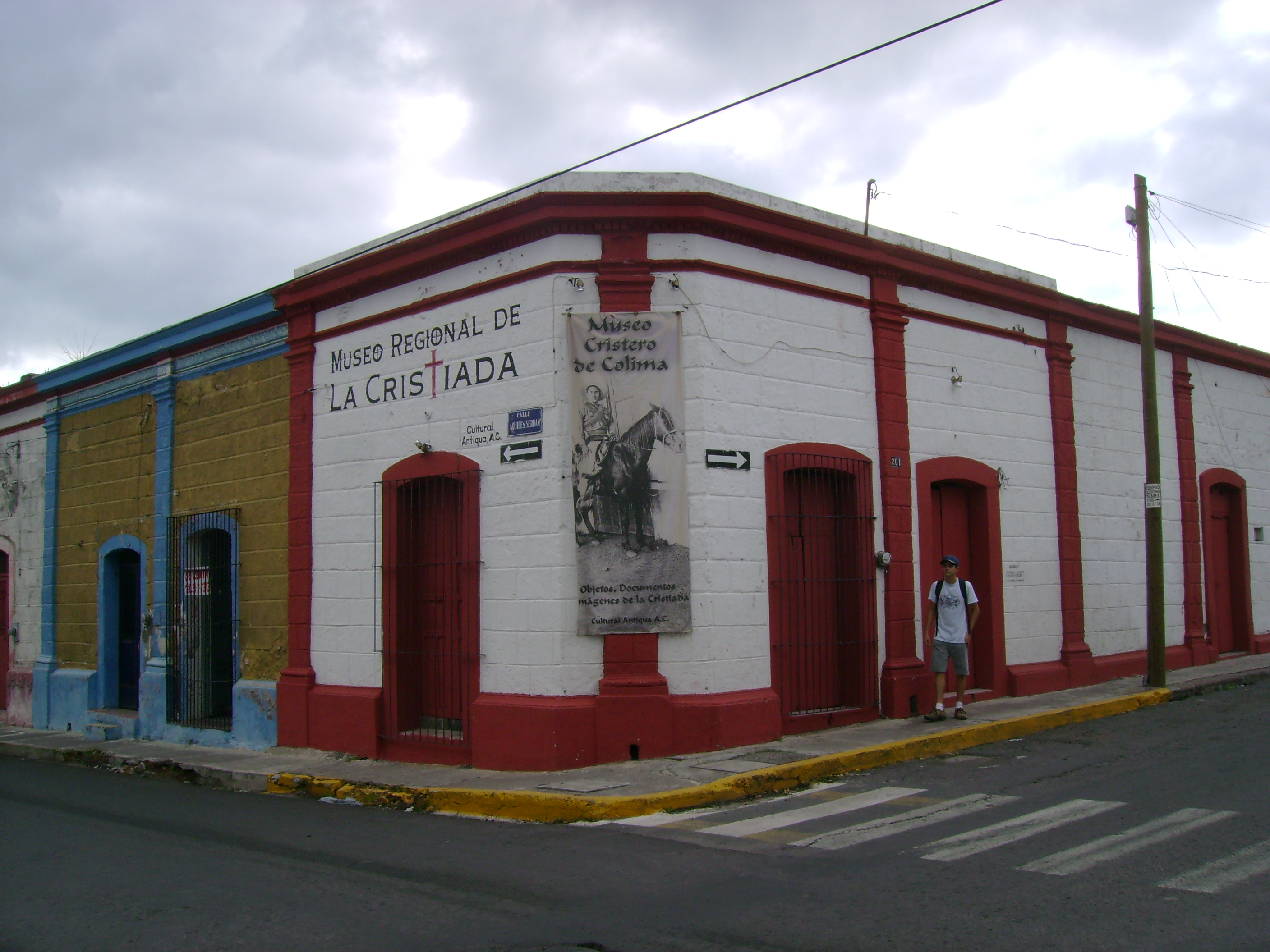 Museo Regional Cristero